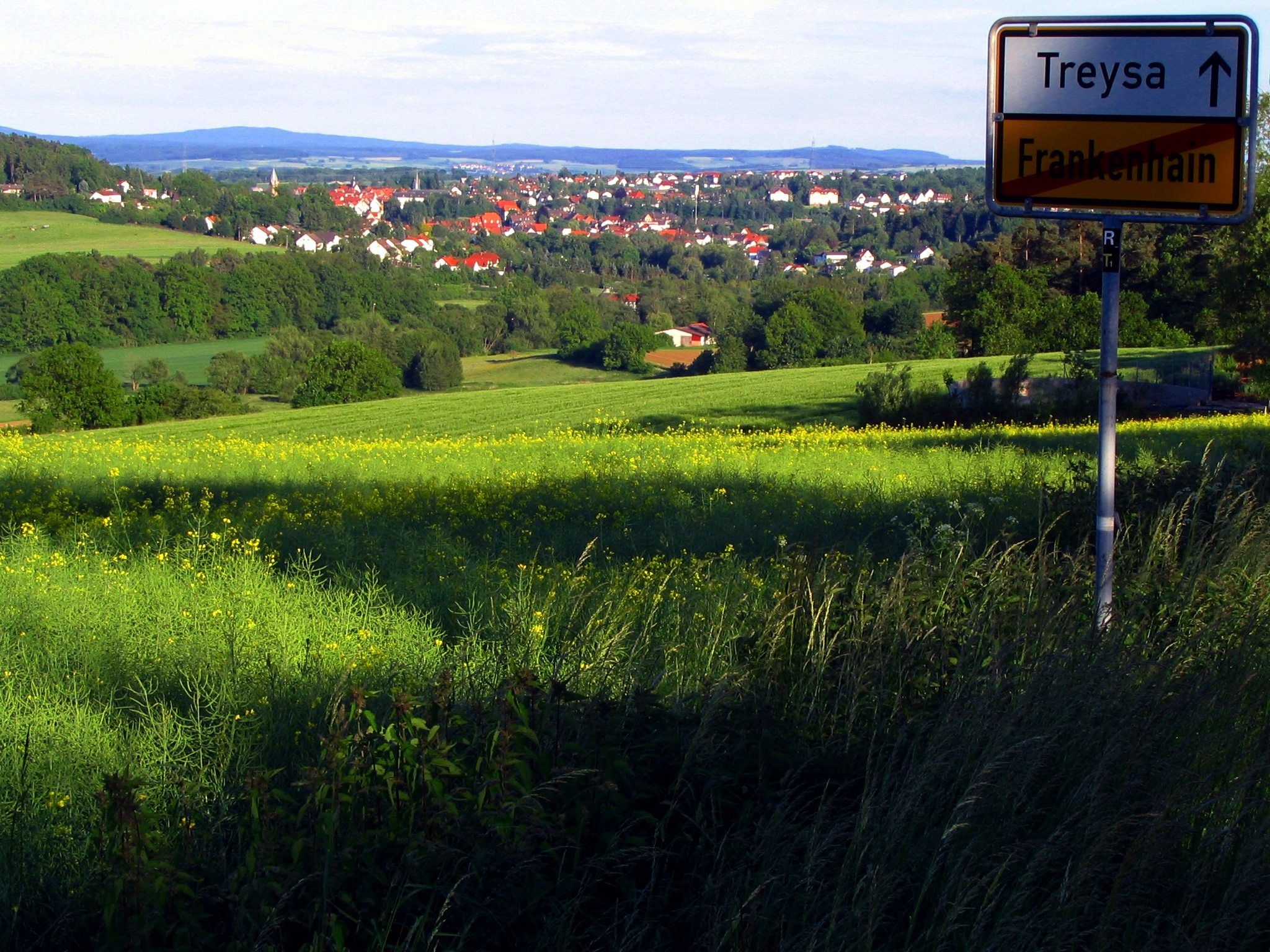 Aussicht auf Schwalmstadt von Frankenhain